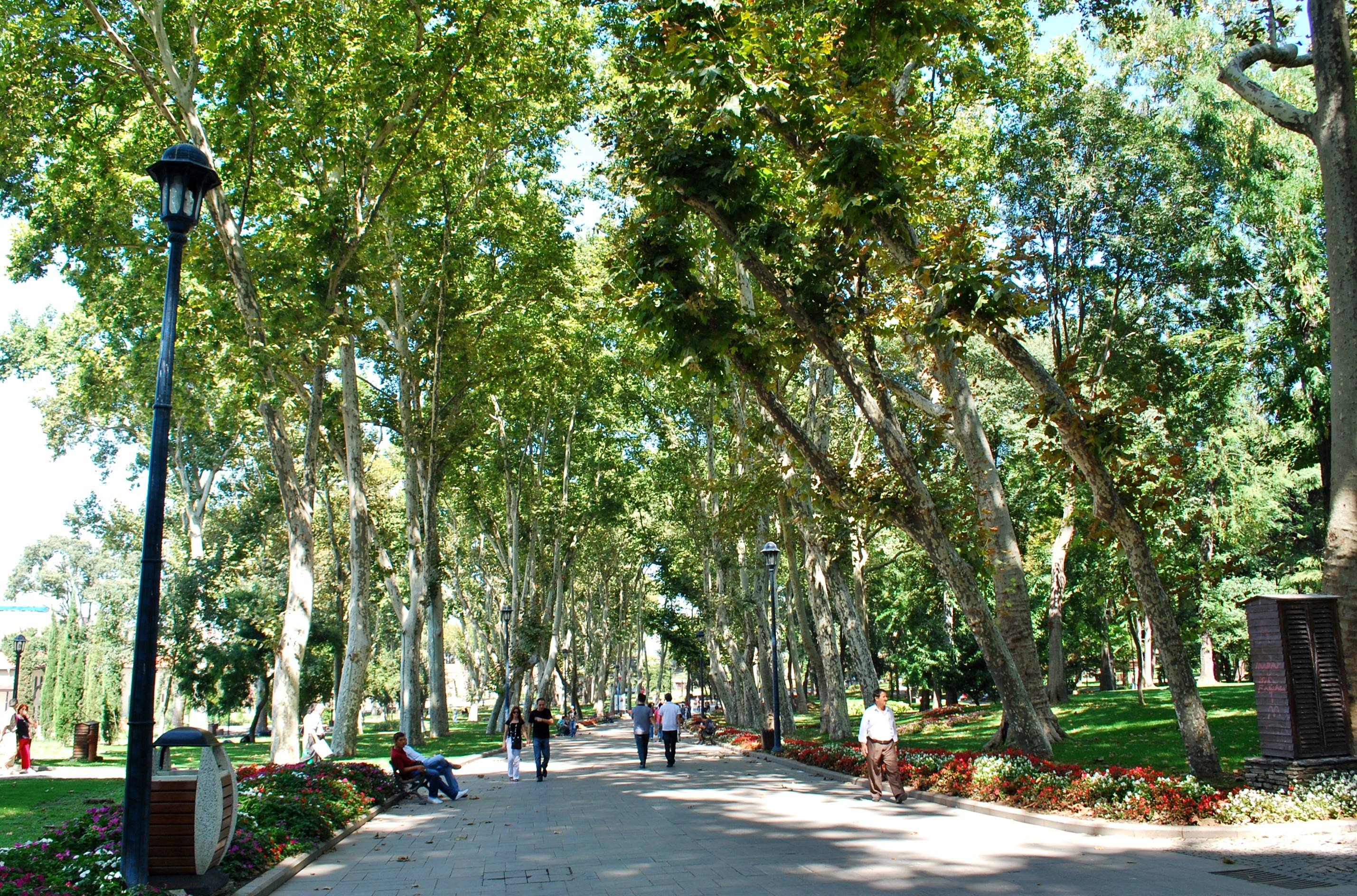 Парк перед дворцом Топкапы